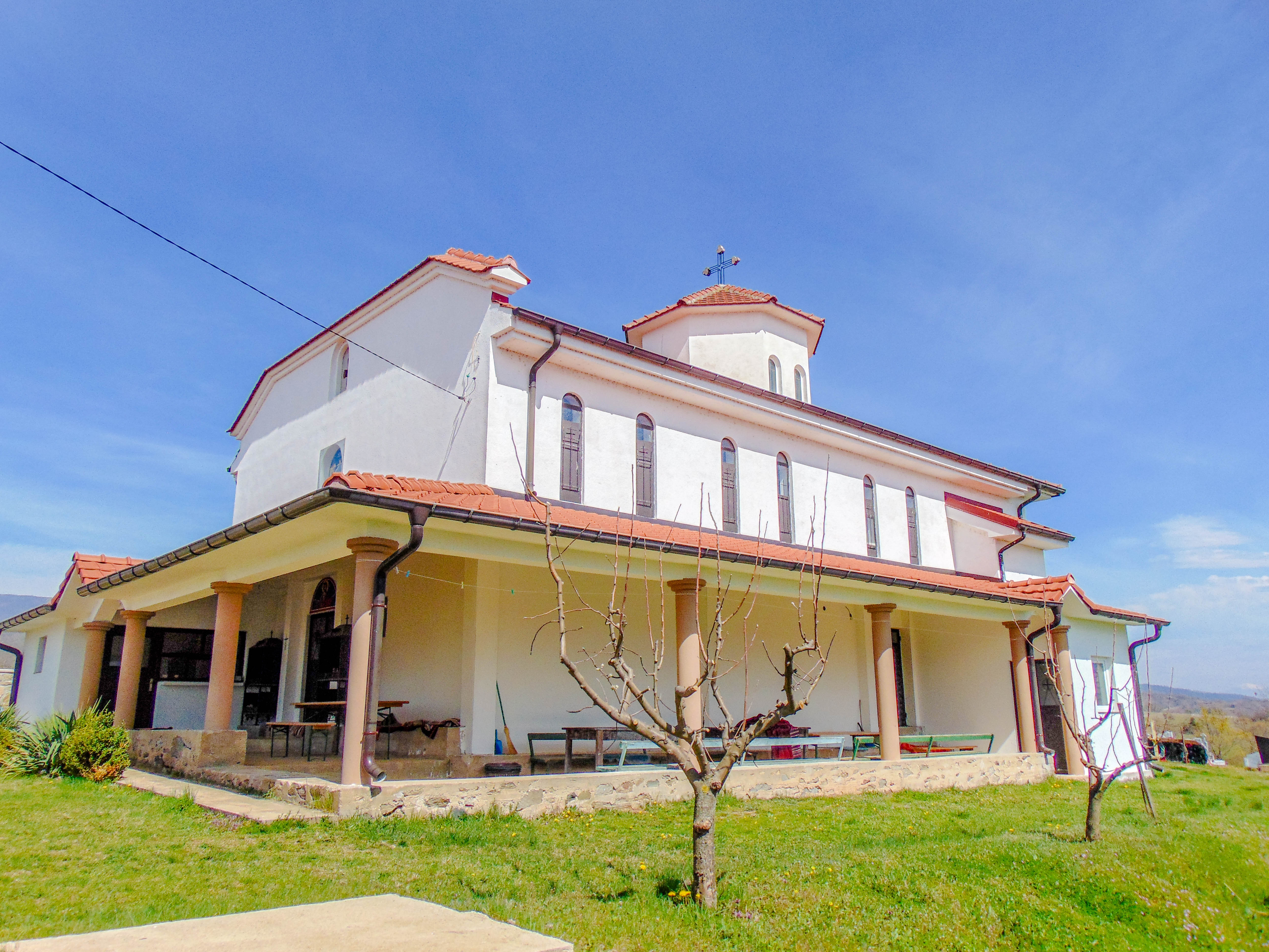 Црква „Св. Успение на Пресвета Богородица“ - Самоилово